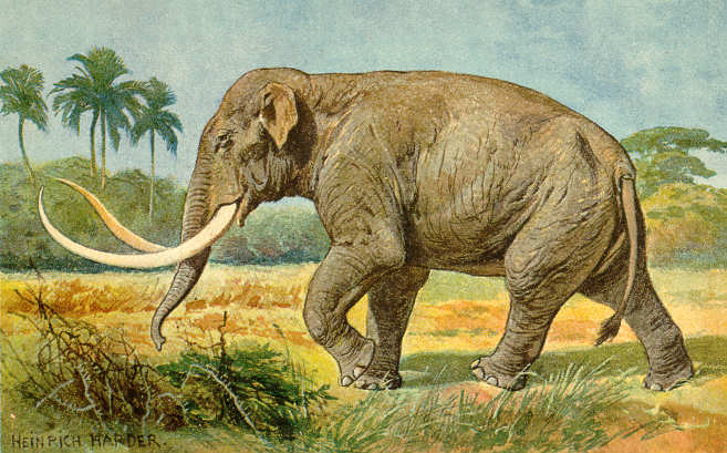 Imperial Elephant